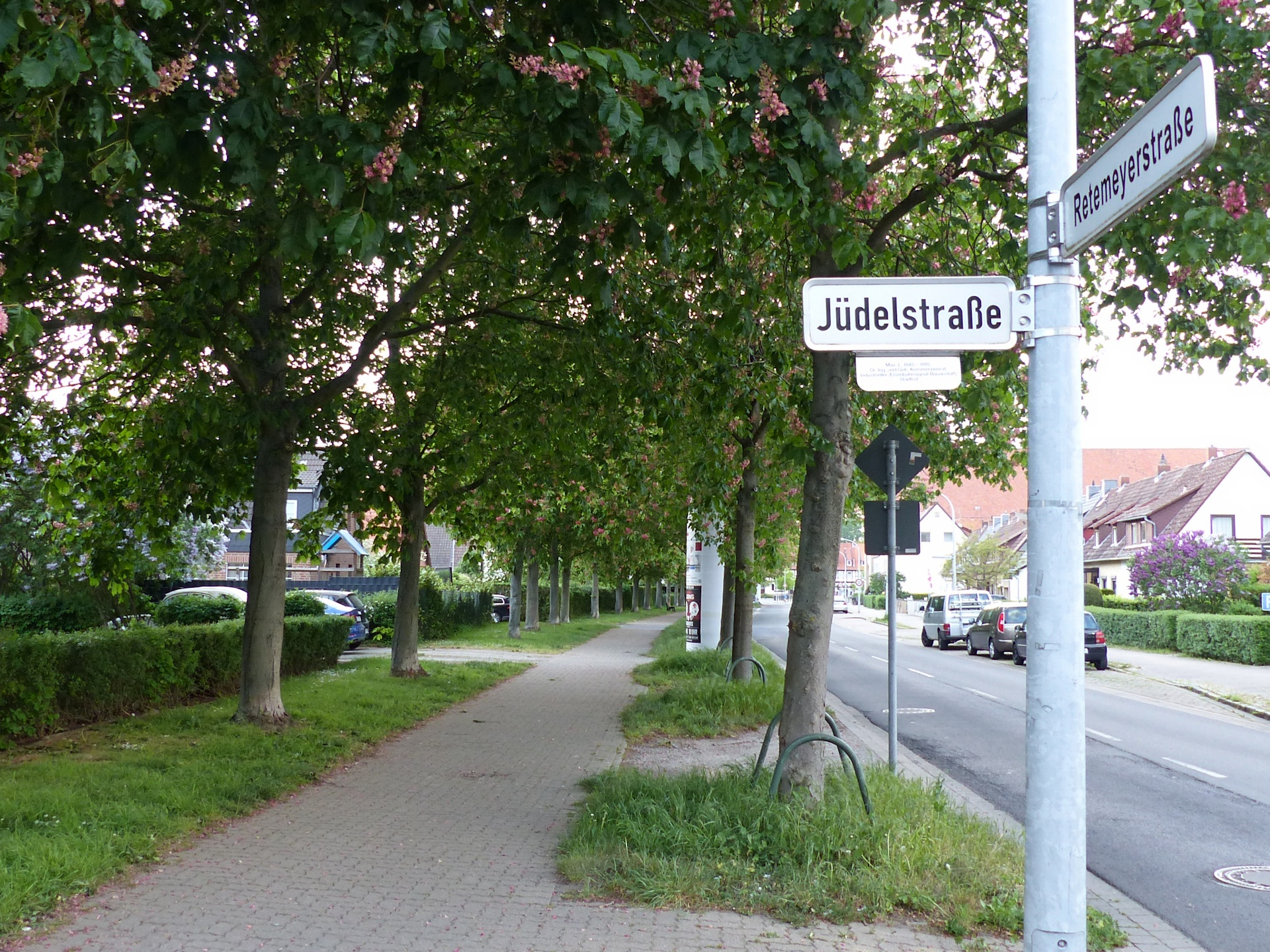 Jüdelstraße im Braunschweiger Stadtteil Südstadt